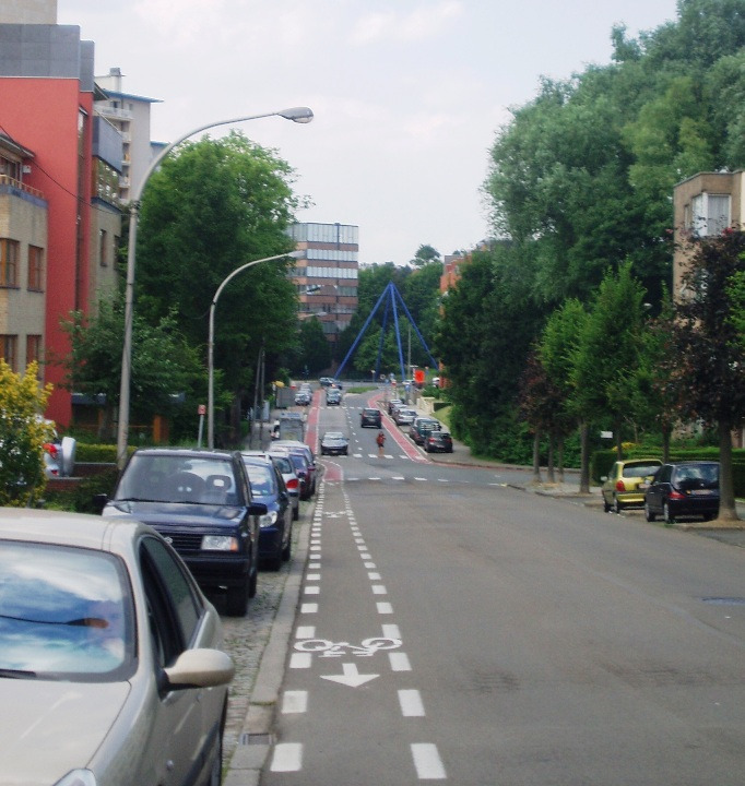 avenue de la Houlette Auderghem Belgium